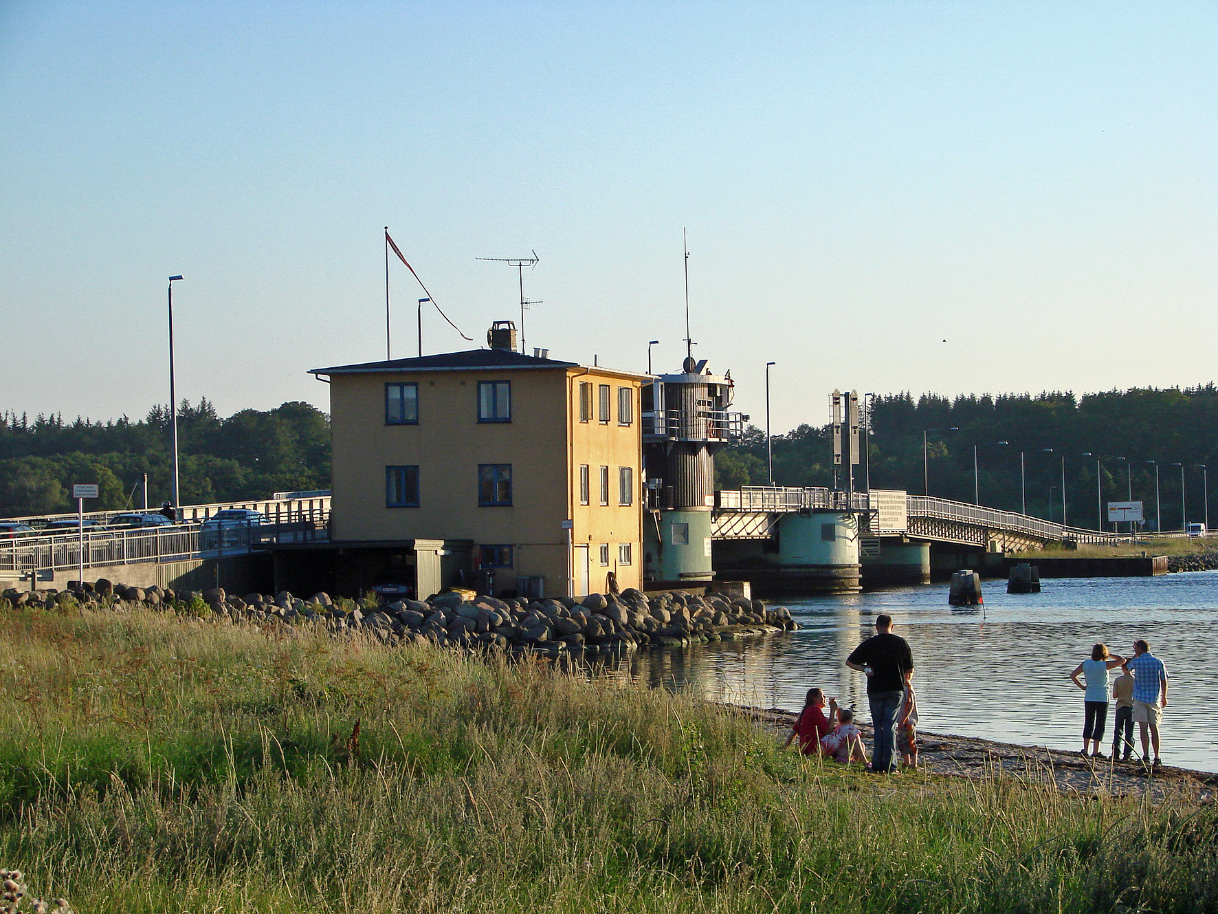 Kronprins Frederiks Bro er en bro over Roskilde Fjord, som forbinder Frederikssund med Hornsherred. Broen set fra Frederikssund mod vest